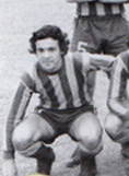 Oscar Rubiola, futbolista de Rosario Central en los años 1970.